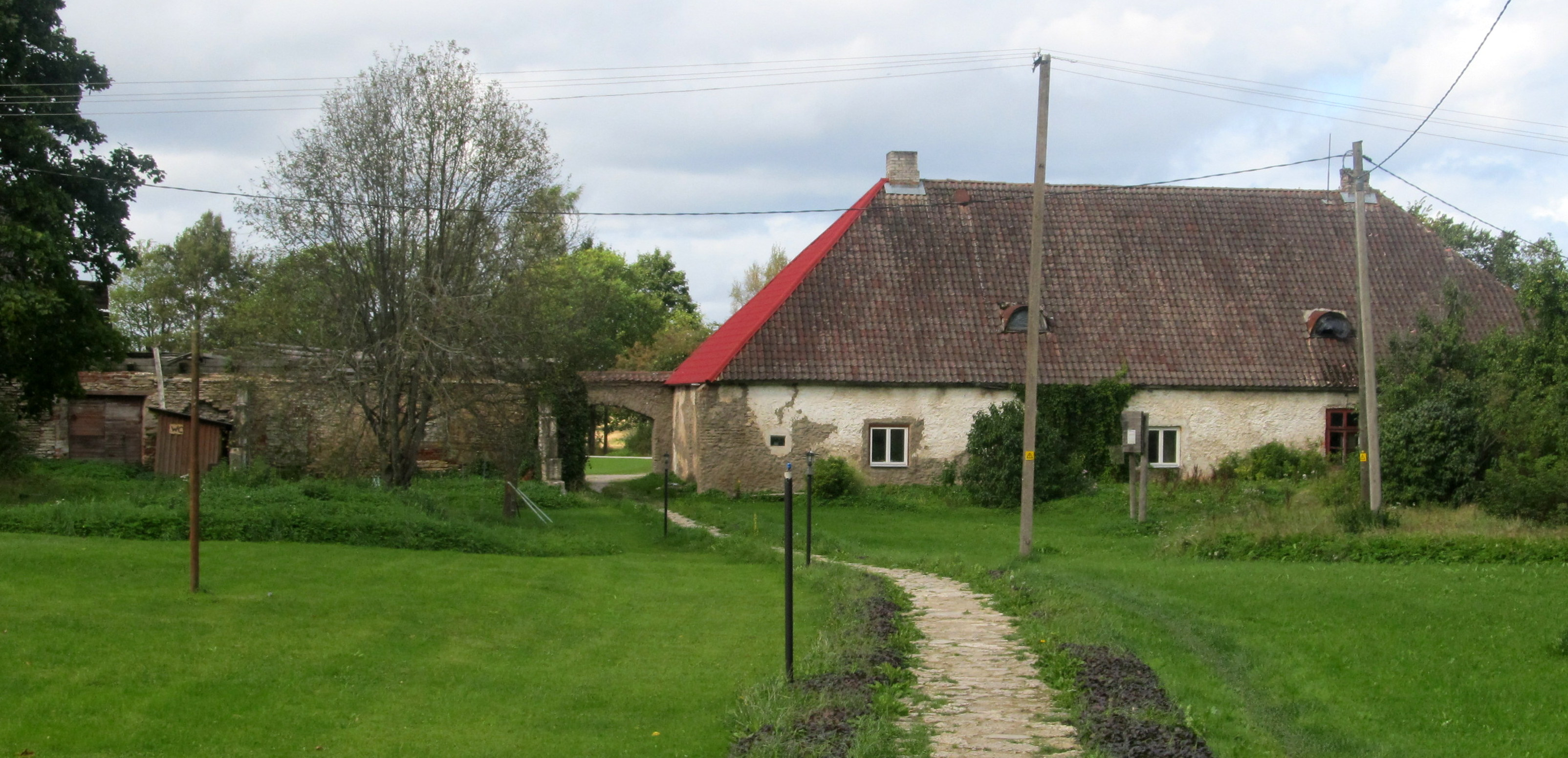 Udriku mõisa karjalaut nr 1